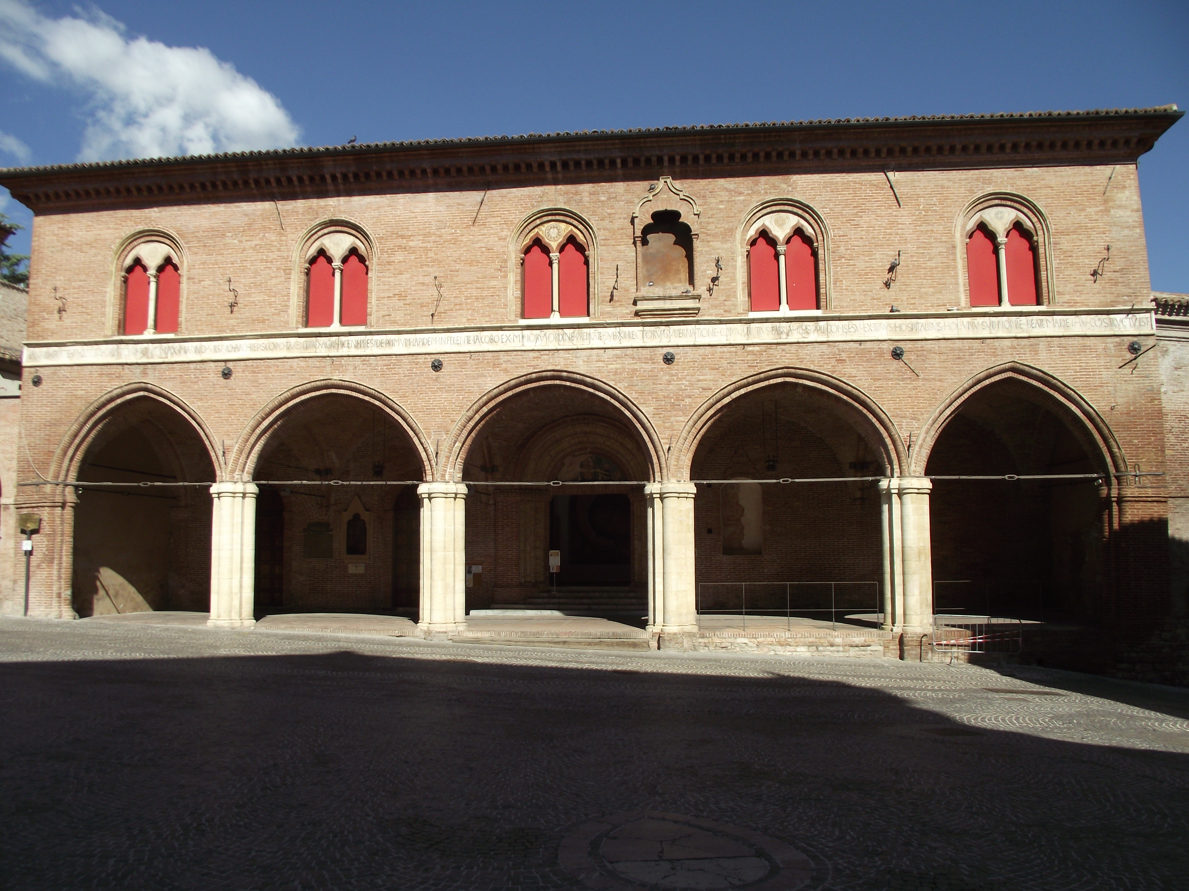 XV secolo